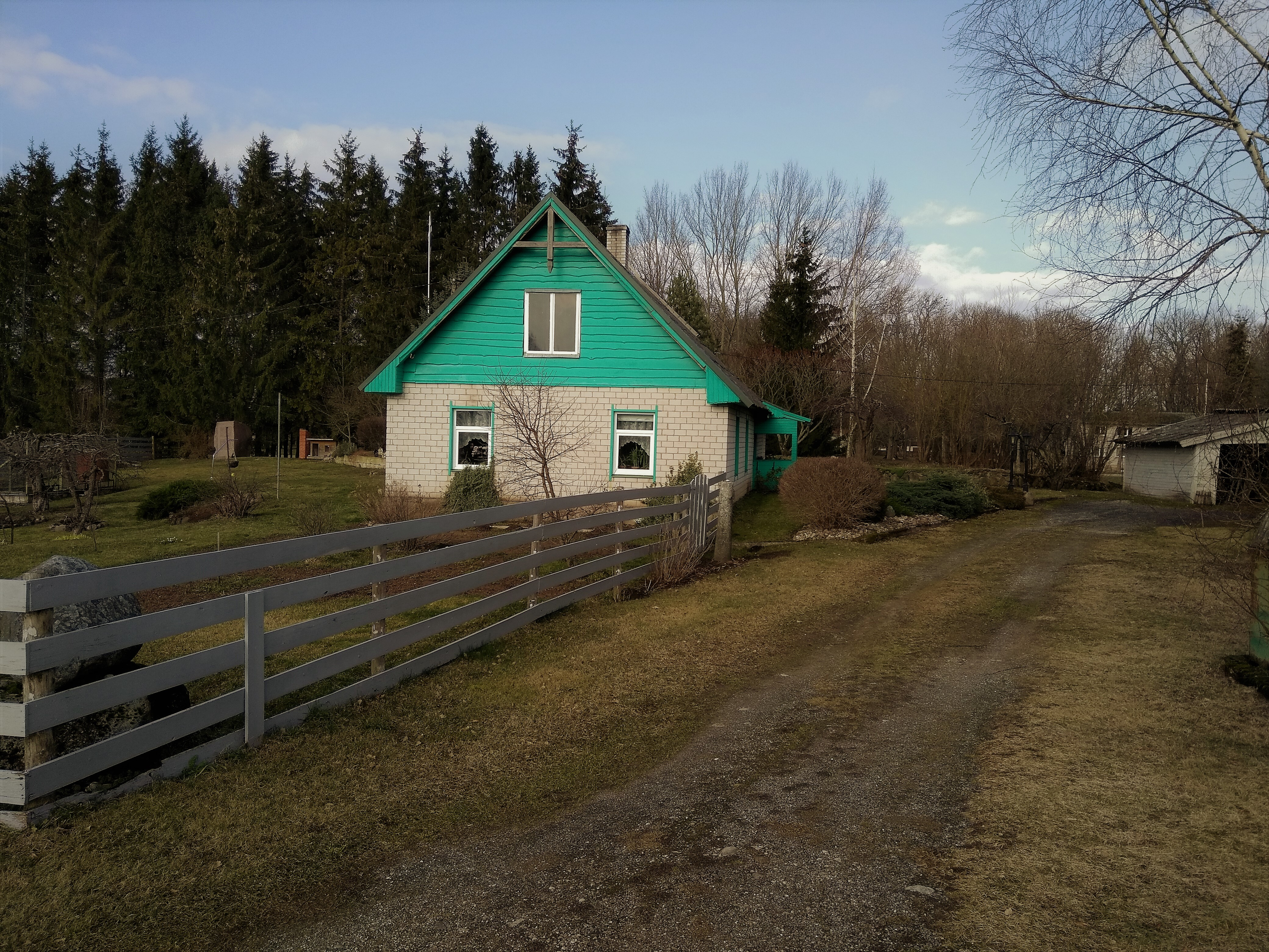 Vaade lõunast üle oletatava sillapea asukoha linnusekohal paiknevale taluhoonele.